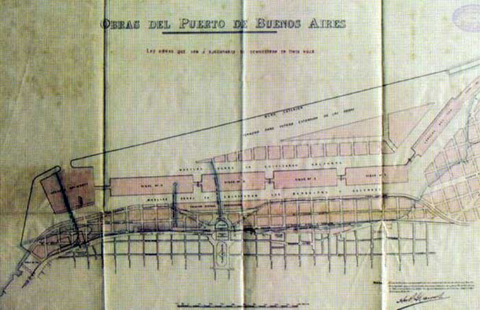 Plano original de Puerto Madero (año 1900 aprox)